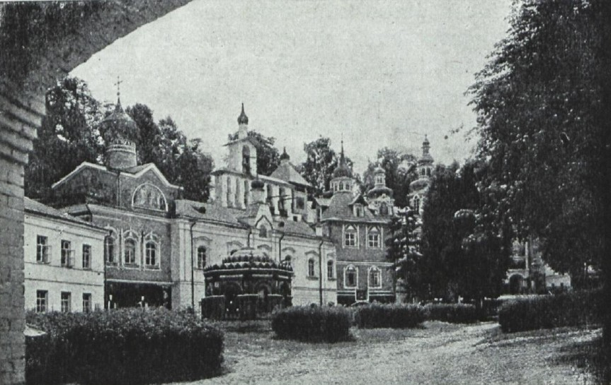 Petseri kloostri õu